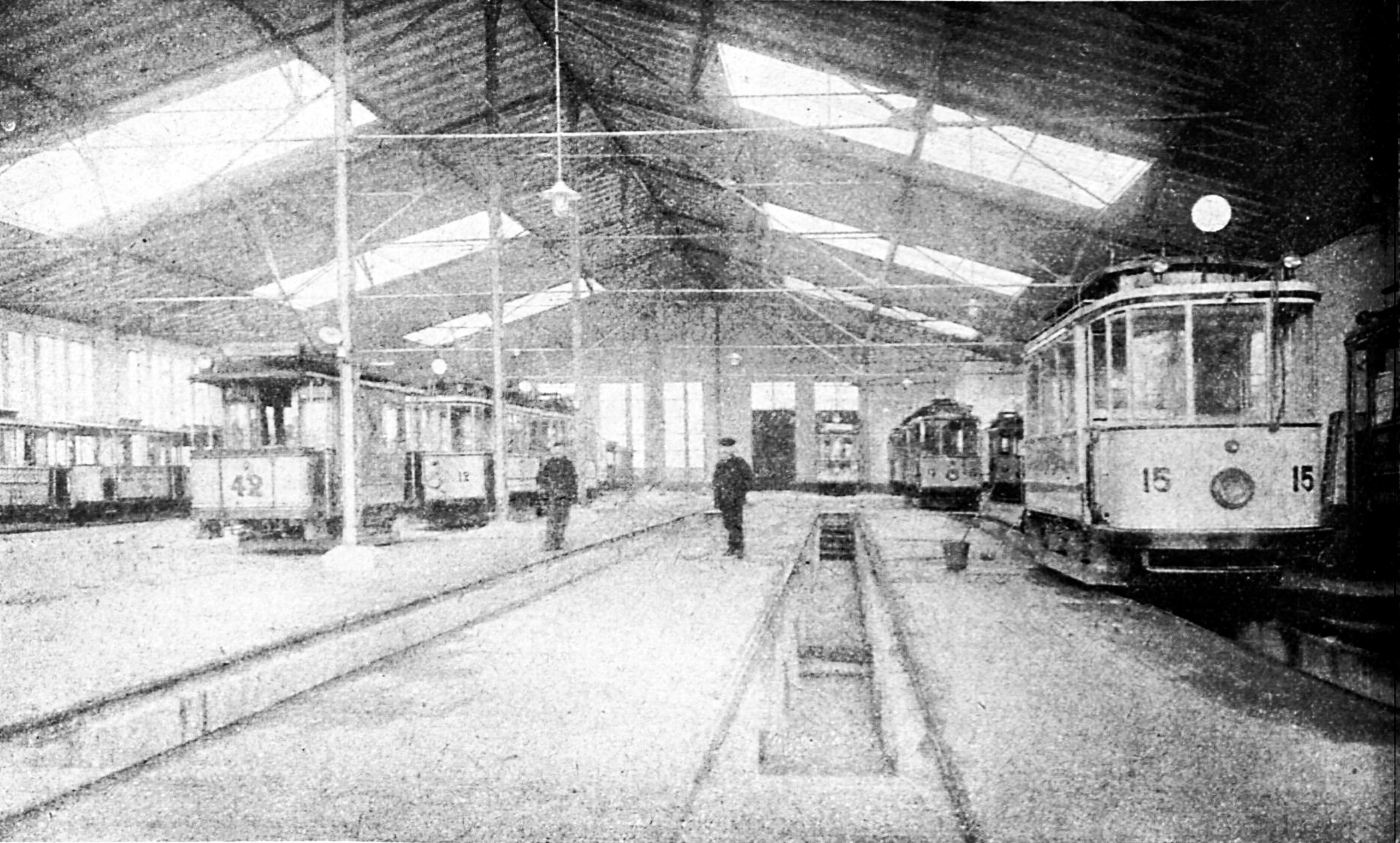 Innenansicht der zusätzlichen Wagenhalle in der Finkenstraße in der Länge.